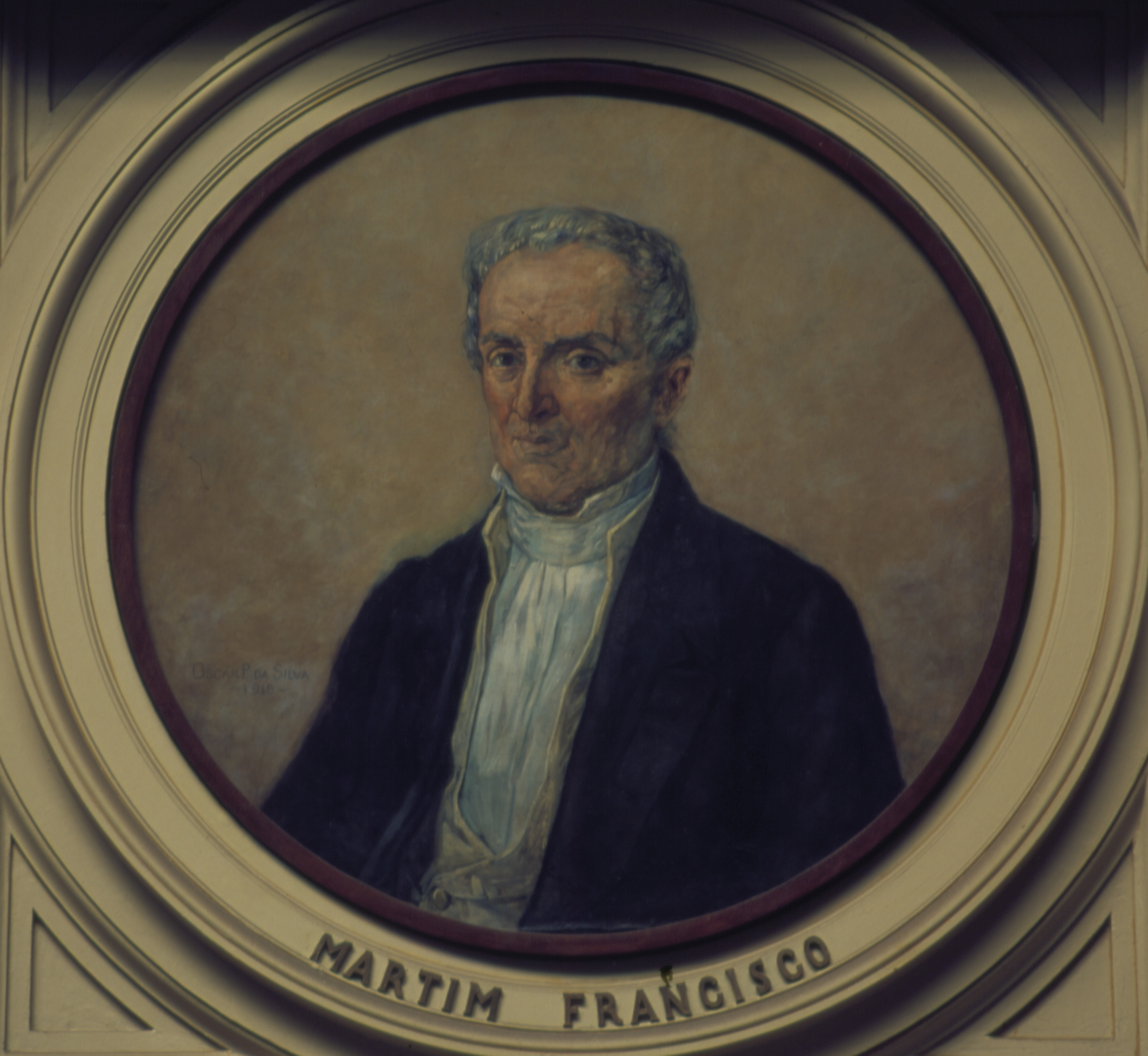 Obra que integra o acervo do Museu Paulista da USP. Coleção Fundo Museu Paulista - FMP